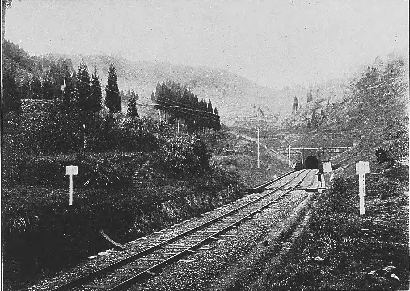 北陸本線の天田越隧道附近の様子。当隧道は1897年（明治30年）7月31日の貫通にして、全長3050尺であった（参考：『北陸政報』1897年（明治30年）8月5日）。